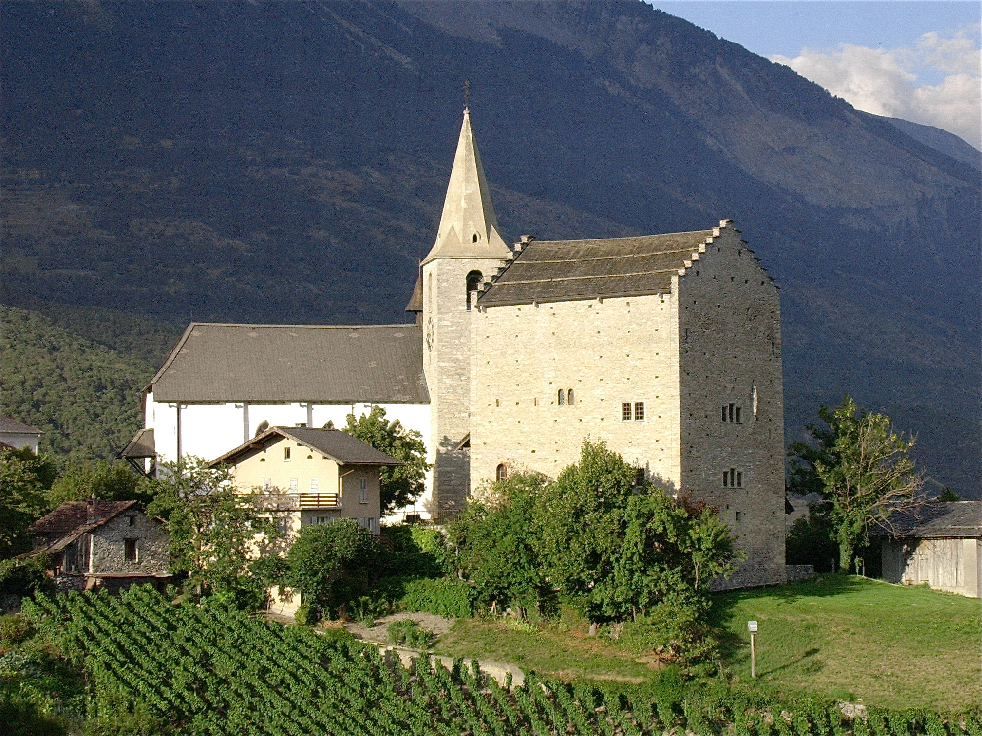 Le château et l'église de Venthône en Valais